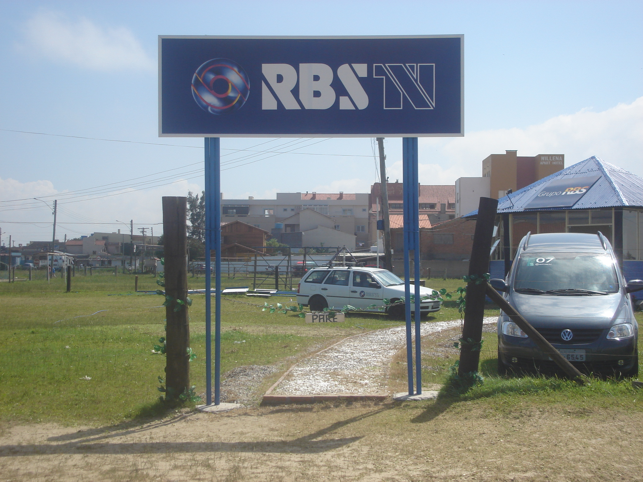 Estúdio de verão da RBS TV na praia do Cassino.